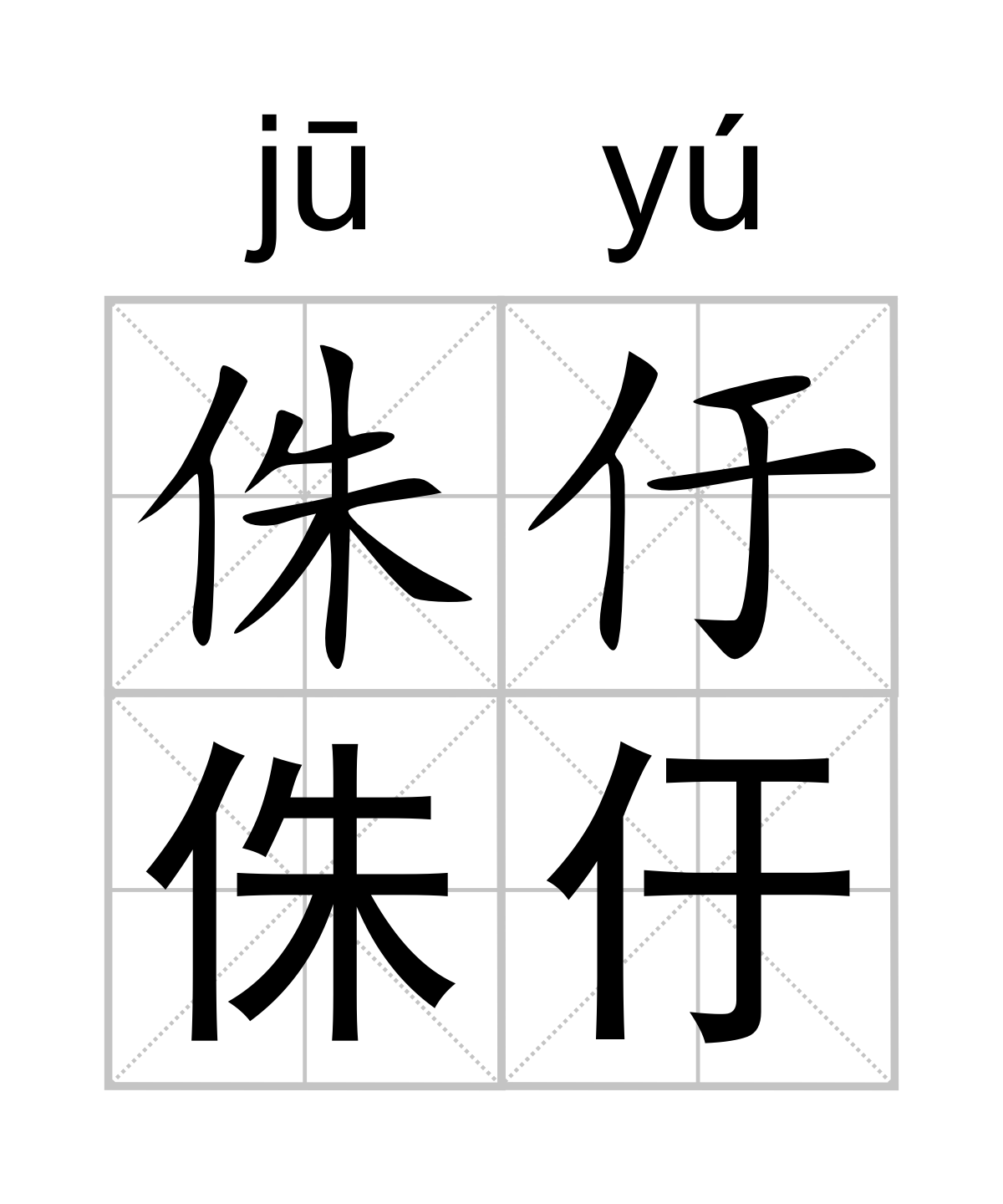 Pronunciation Of Town Name.